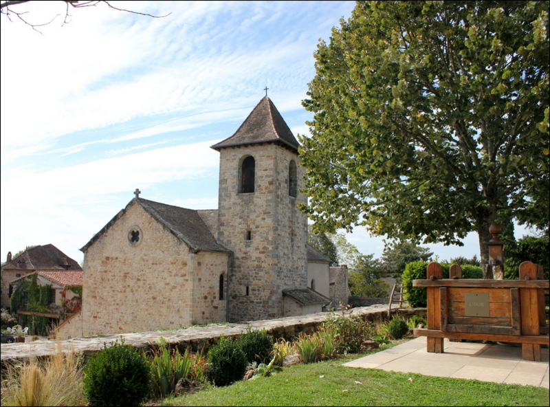 Eglise Saint-Jean-Baptiste à Capdenac-le-Haut